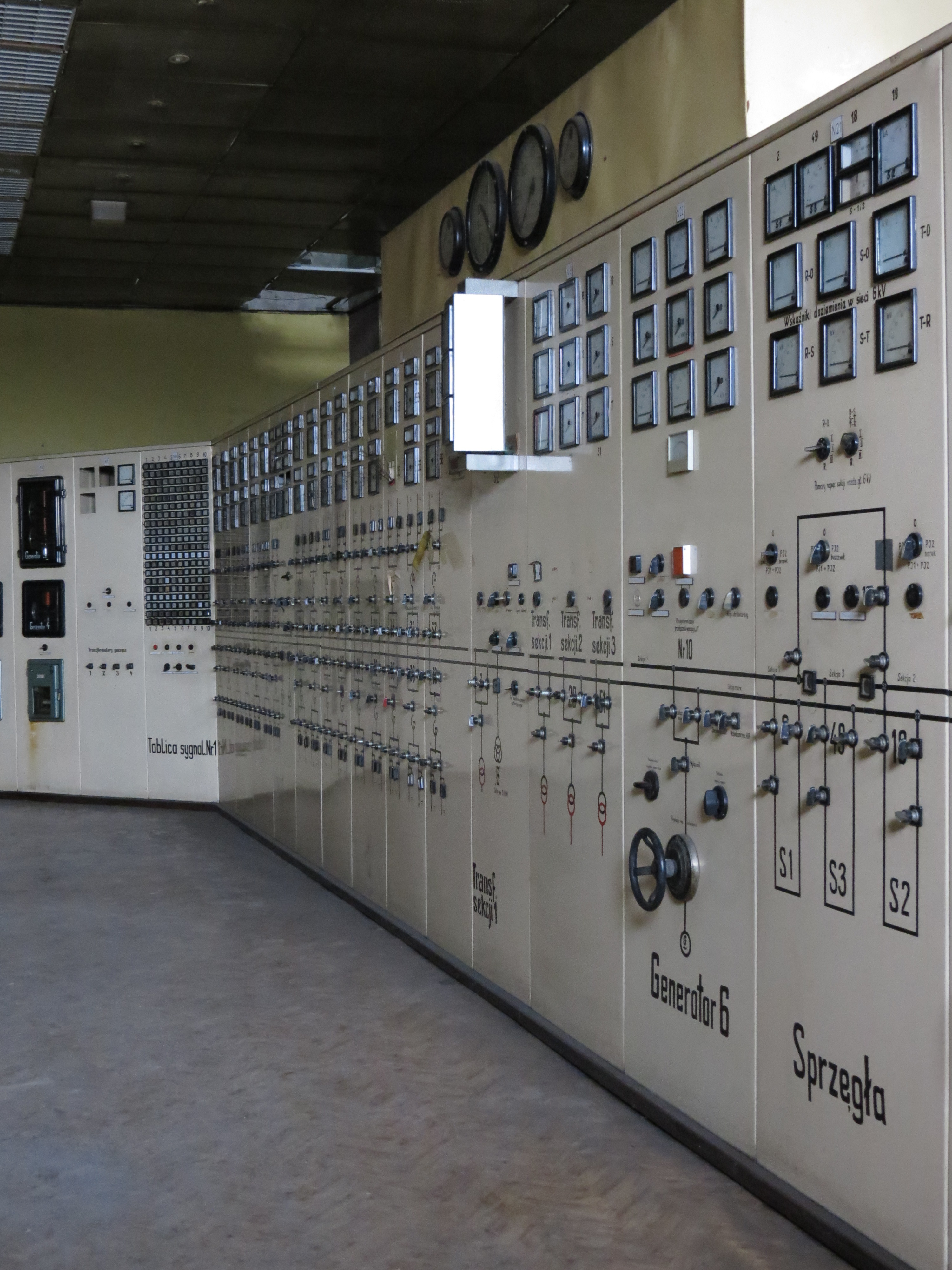 Wnętrze nastawni EC Szombierki